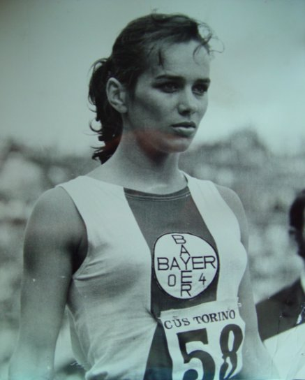 Heidi Schüller, Torino, 1972